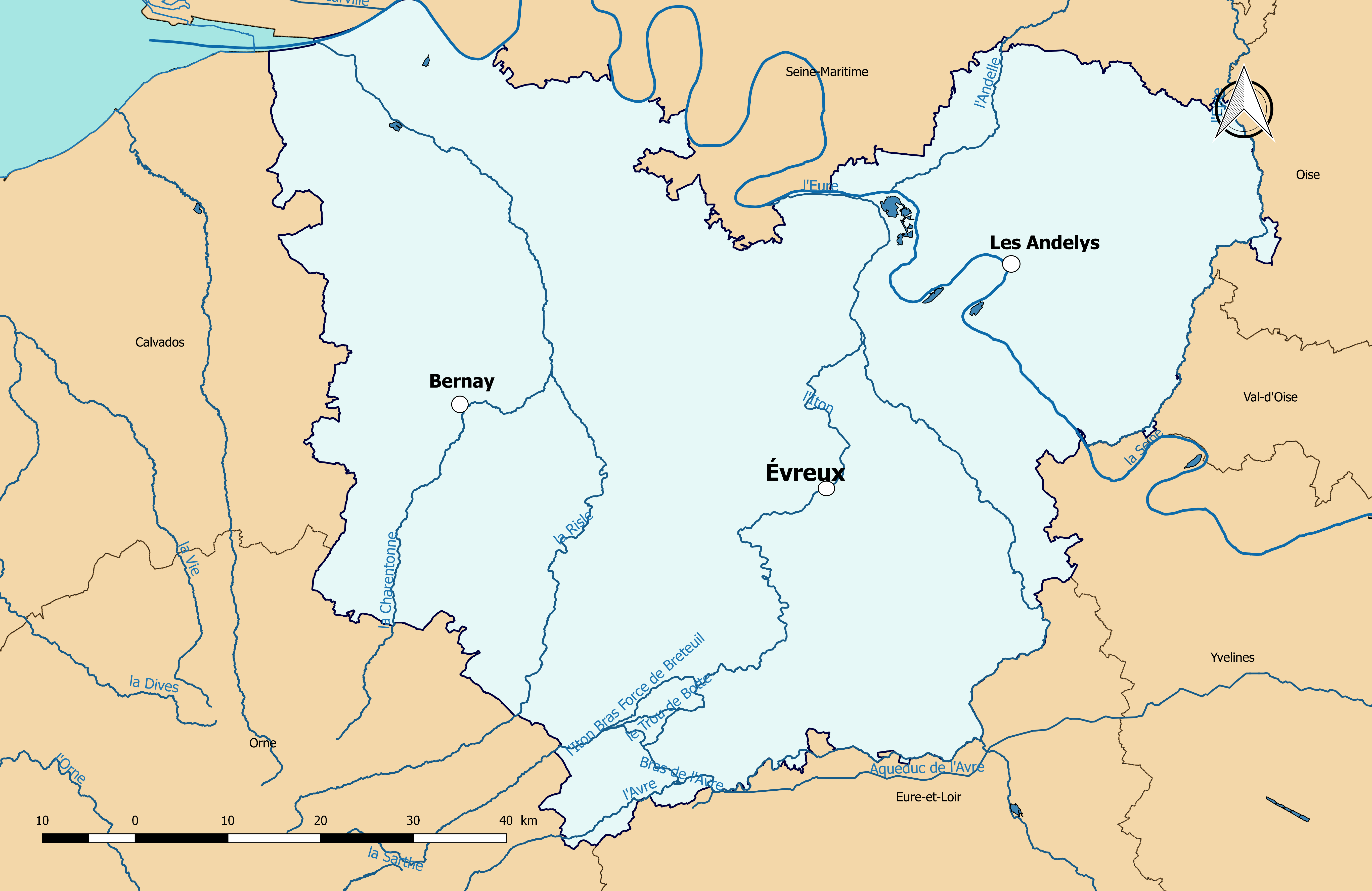 Carte des cours d'eau de longueur supérieure à 15 km dans le département de l'Eure (France).